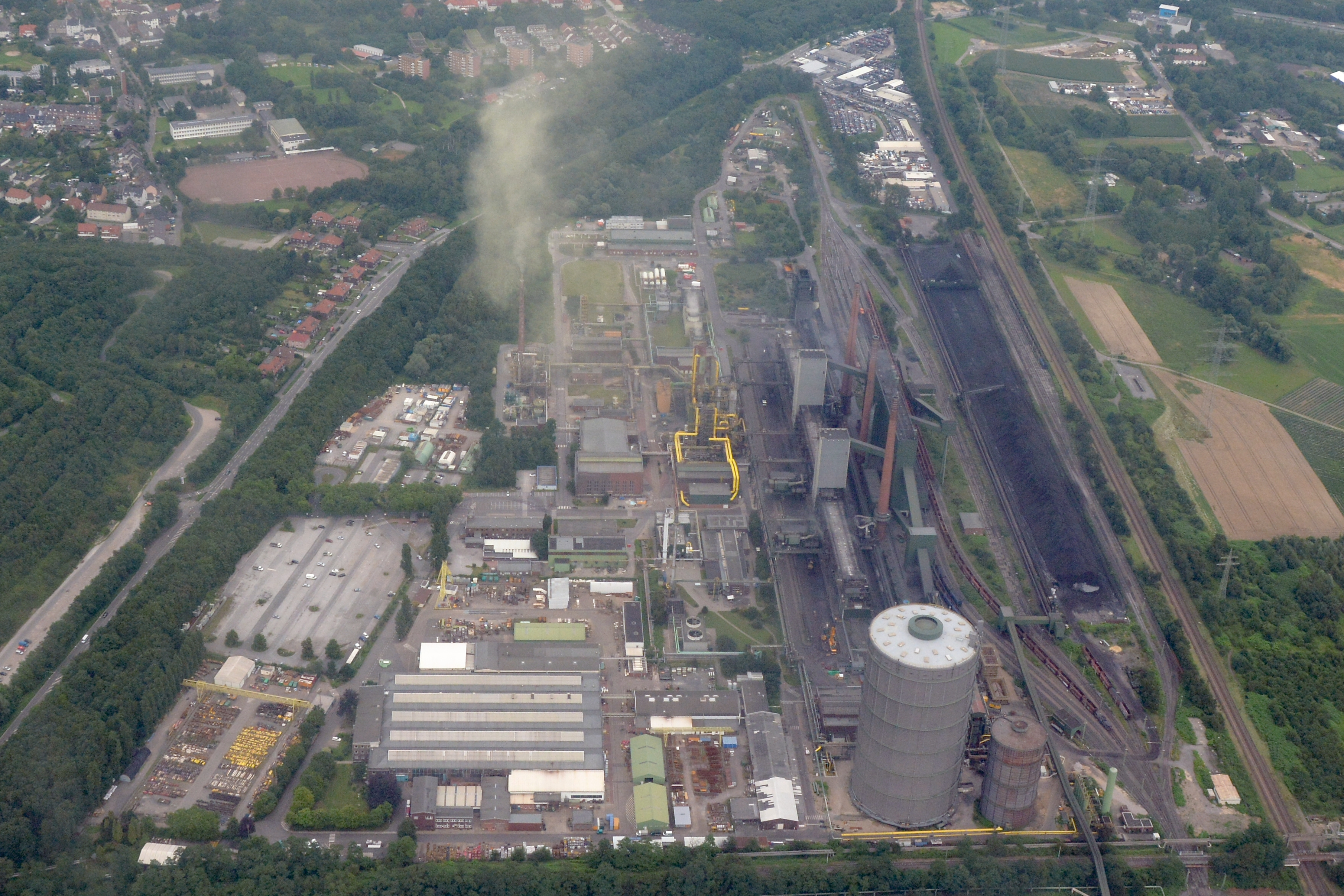 Werksgelände ArcelorMittal Bottrop